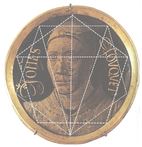 Composition géométrique de l'autoportrait de Jean Fouquet (OA 56 ).